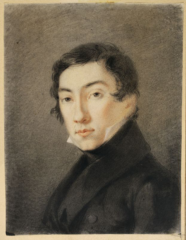 Беларуская (тарашкевіца): Партрэт Юльяна Корсака (Juljan Korsak)